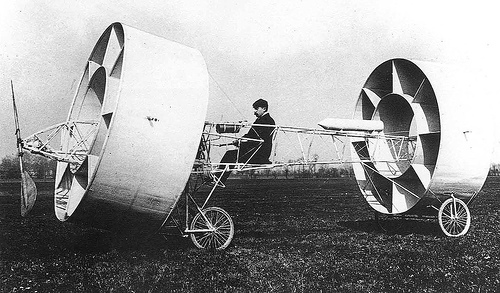 Аэроплан Живодана